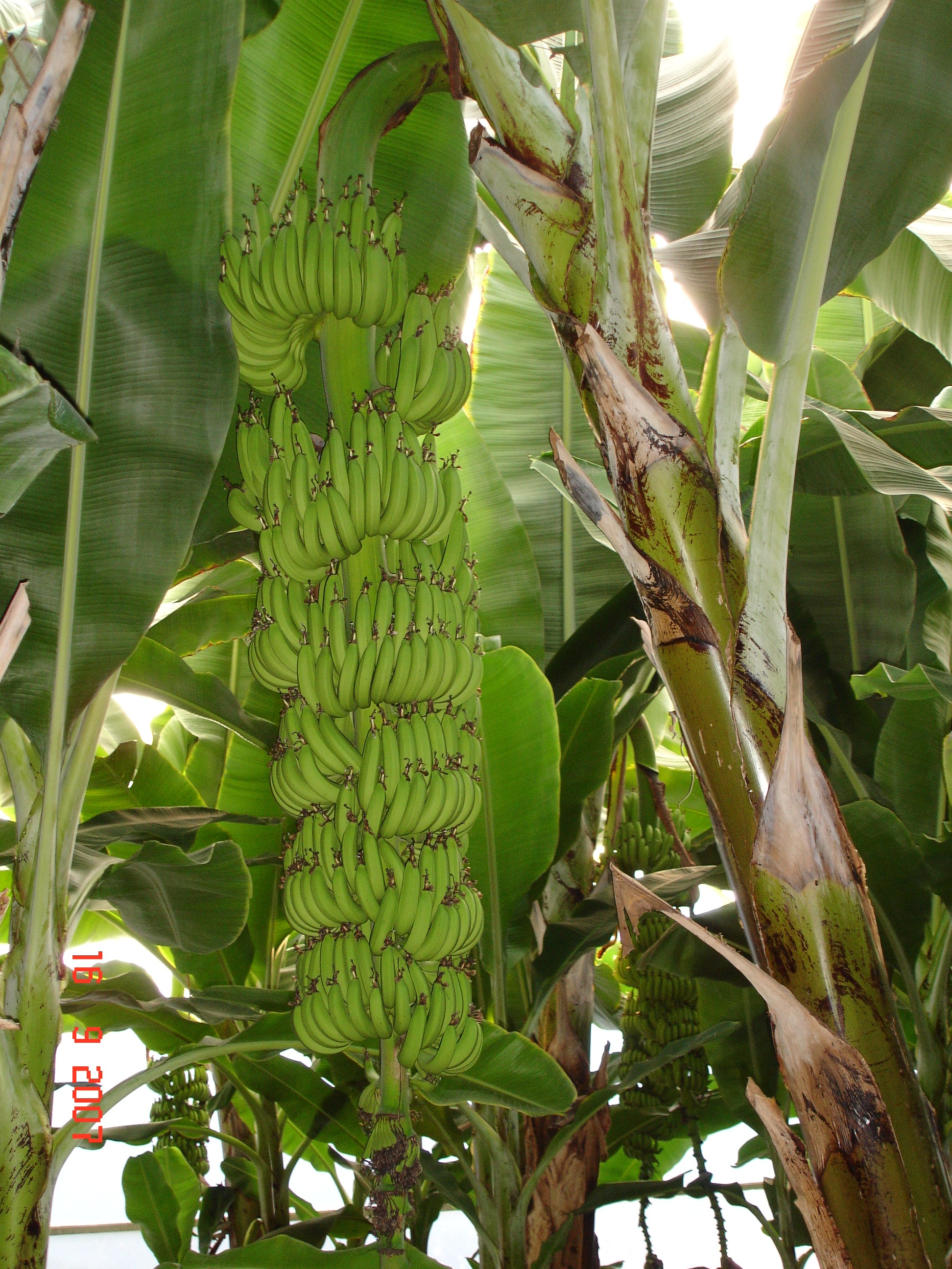 Alanya'daki bir serada üretilen muzlar.